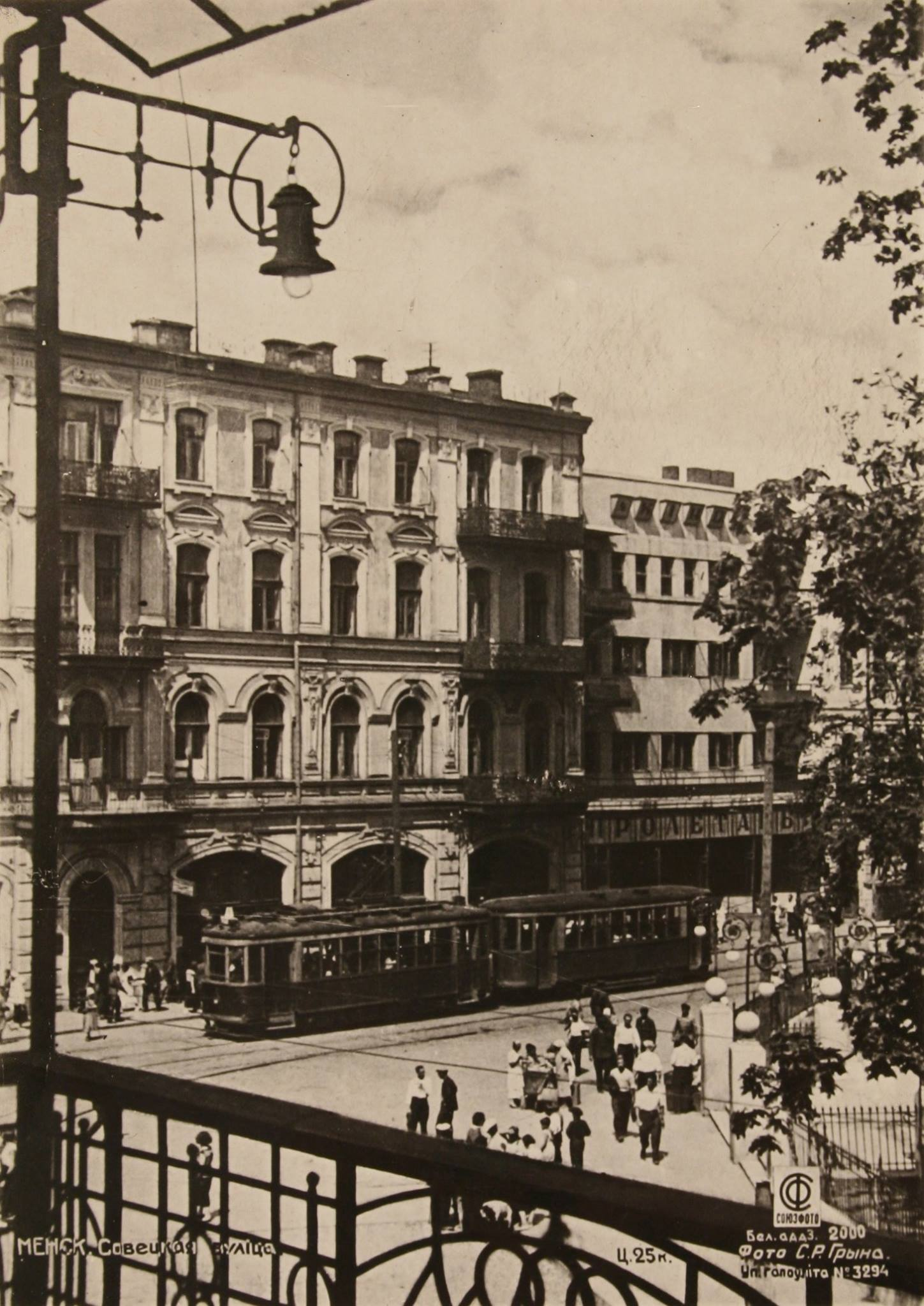 Від з акна Дома Чырвонай Арміі (былая гасцініца "Парыж") на дом Поляка і новы кінатэатр "Пралетарый" (скрыжаванне цяперашняга пр-та Незалежнасці і вул.Энгельса, будынкі не захаваліся на іх месцы пл.Кастрычніцкая перад Палацам Рэспублікі).Беларуская (тарашкевіца): Менск (Miensk), Новае Места (Novaje Miesta). Кінатэатар «Пралетар»